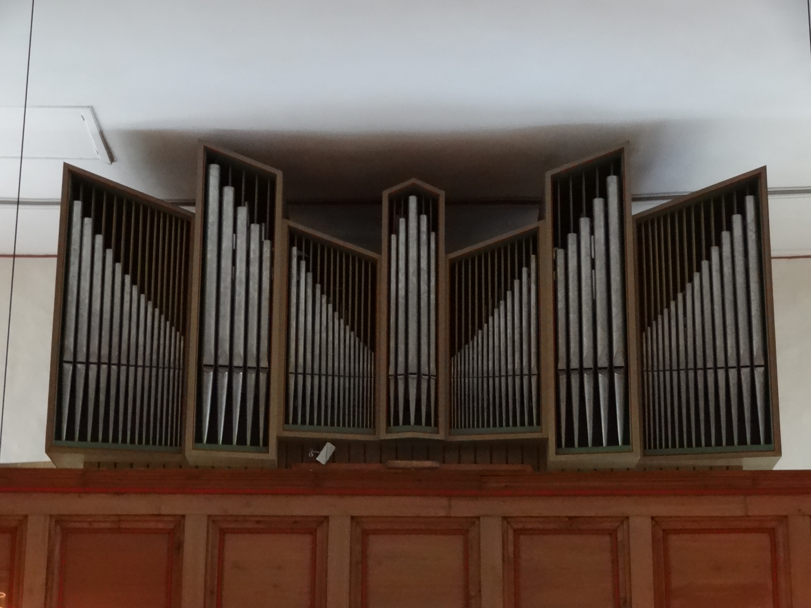 Evangelische Kirche Wieseck